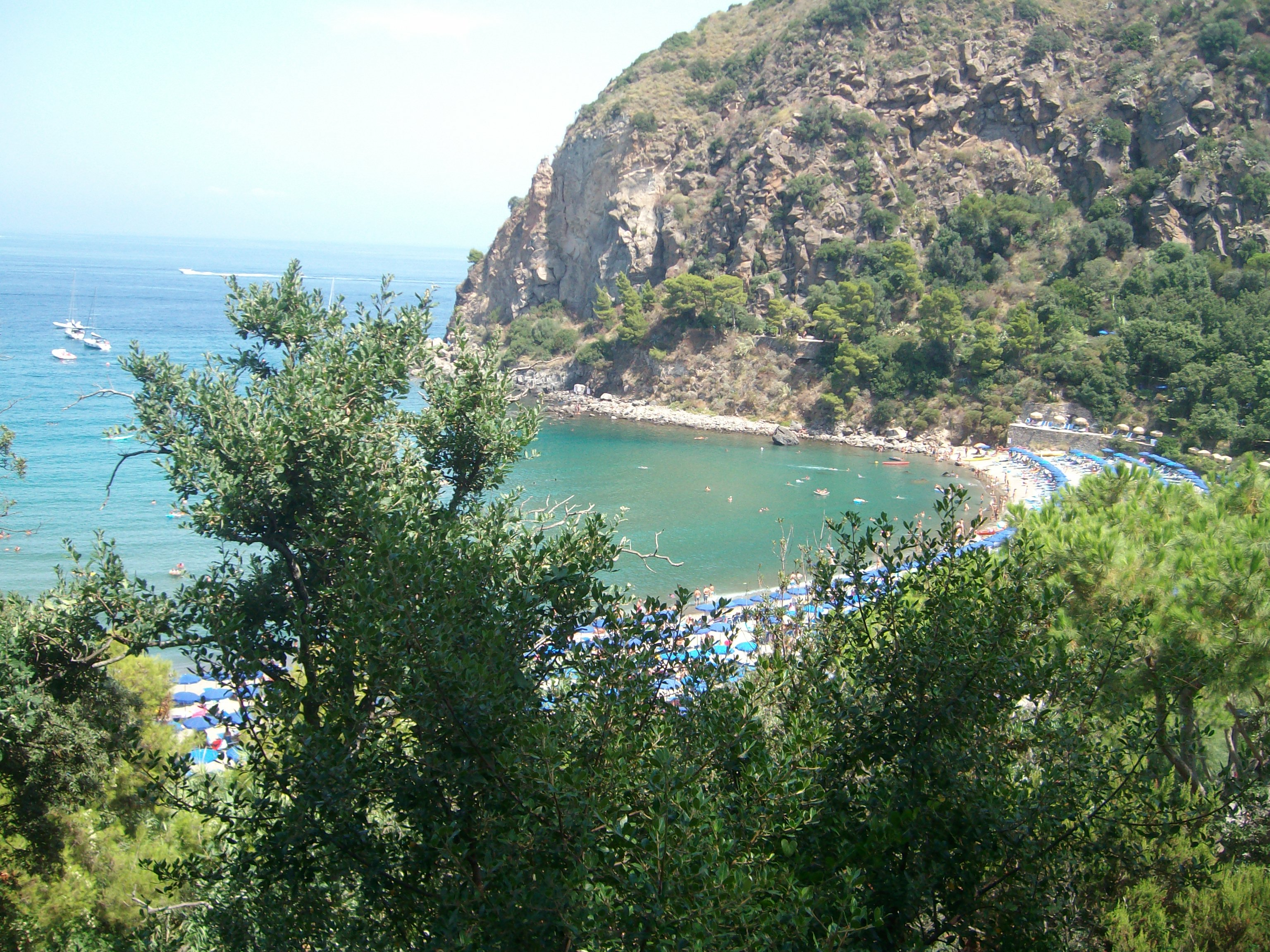 Via S. Montano, 8, 80076 Lacco Ameno NA, Italy